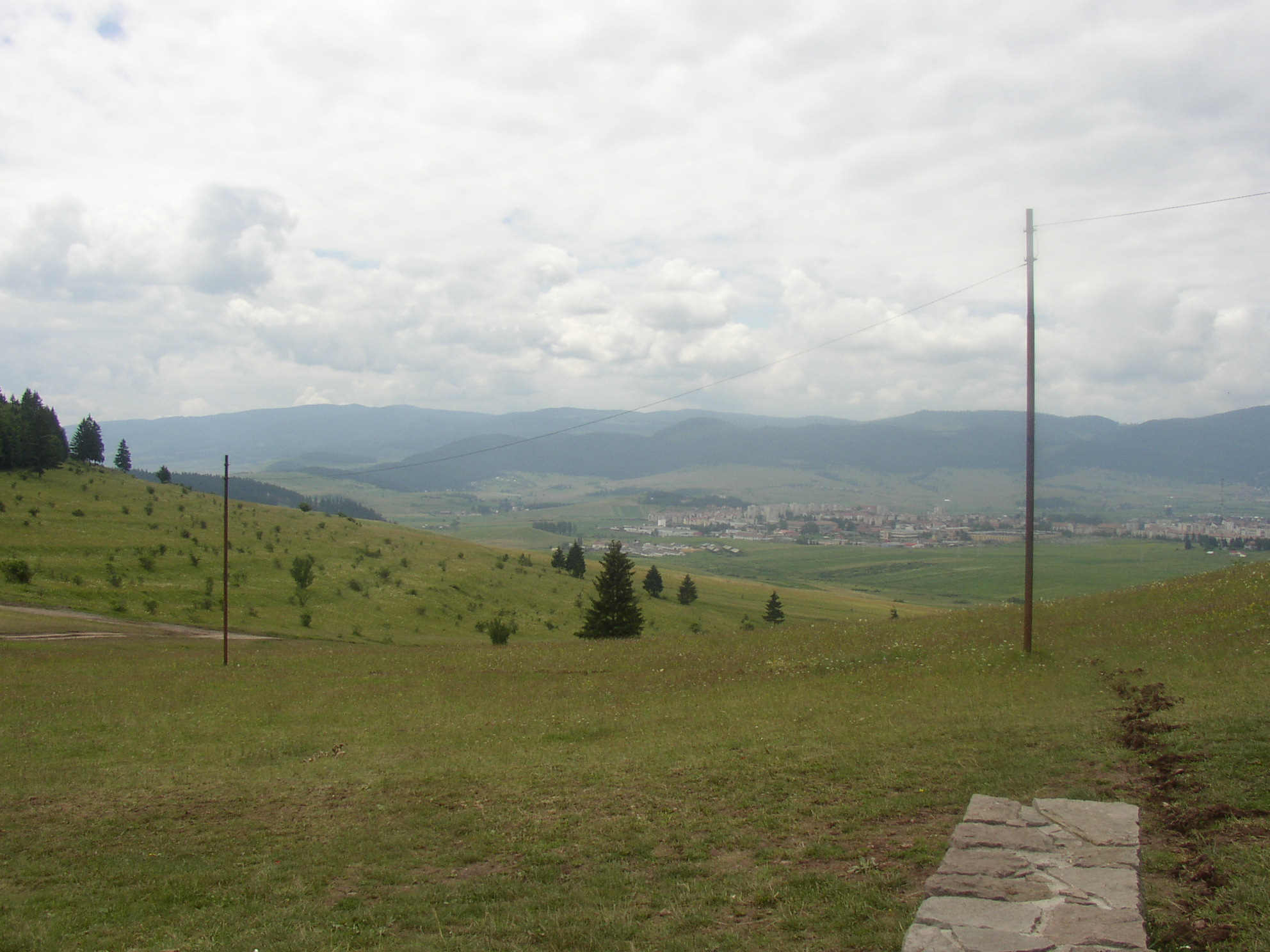 Miercurea Ciuc Panorama